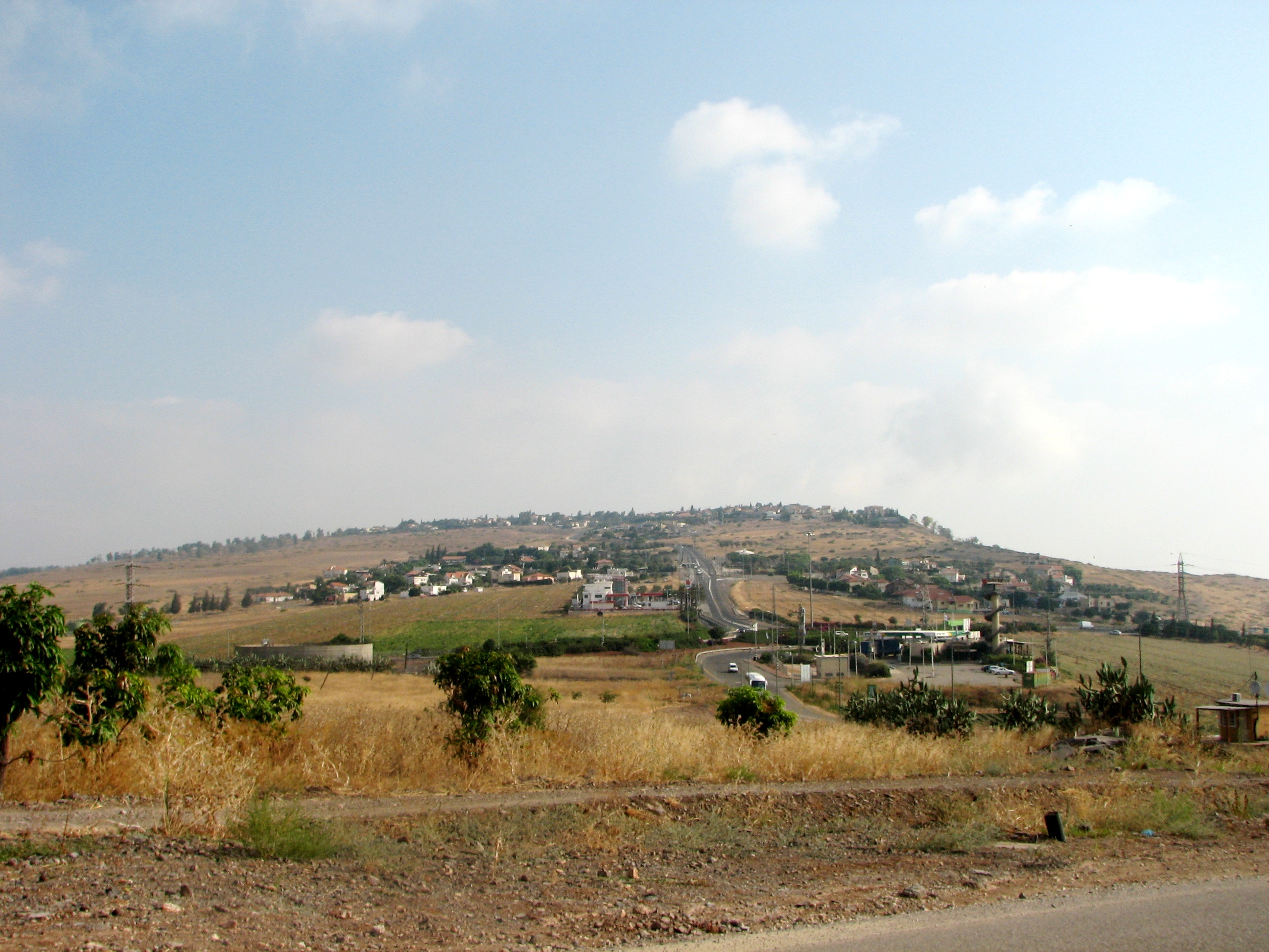 Poria Illit is a communal settlement in northern Israel Located to the south of the Sea of Galilee, Israel פוריה עילית הוא יישוב קהילתי באזור הצפון על רכס פוריה ליד העיר טבריה, השייך למועצה אזורית עמק הירדן. . למעלה ברכס פוריה עלית, מתחת פוריה כפר עבודה